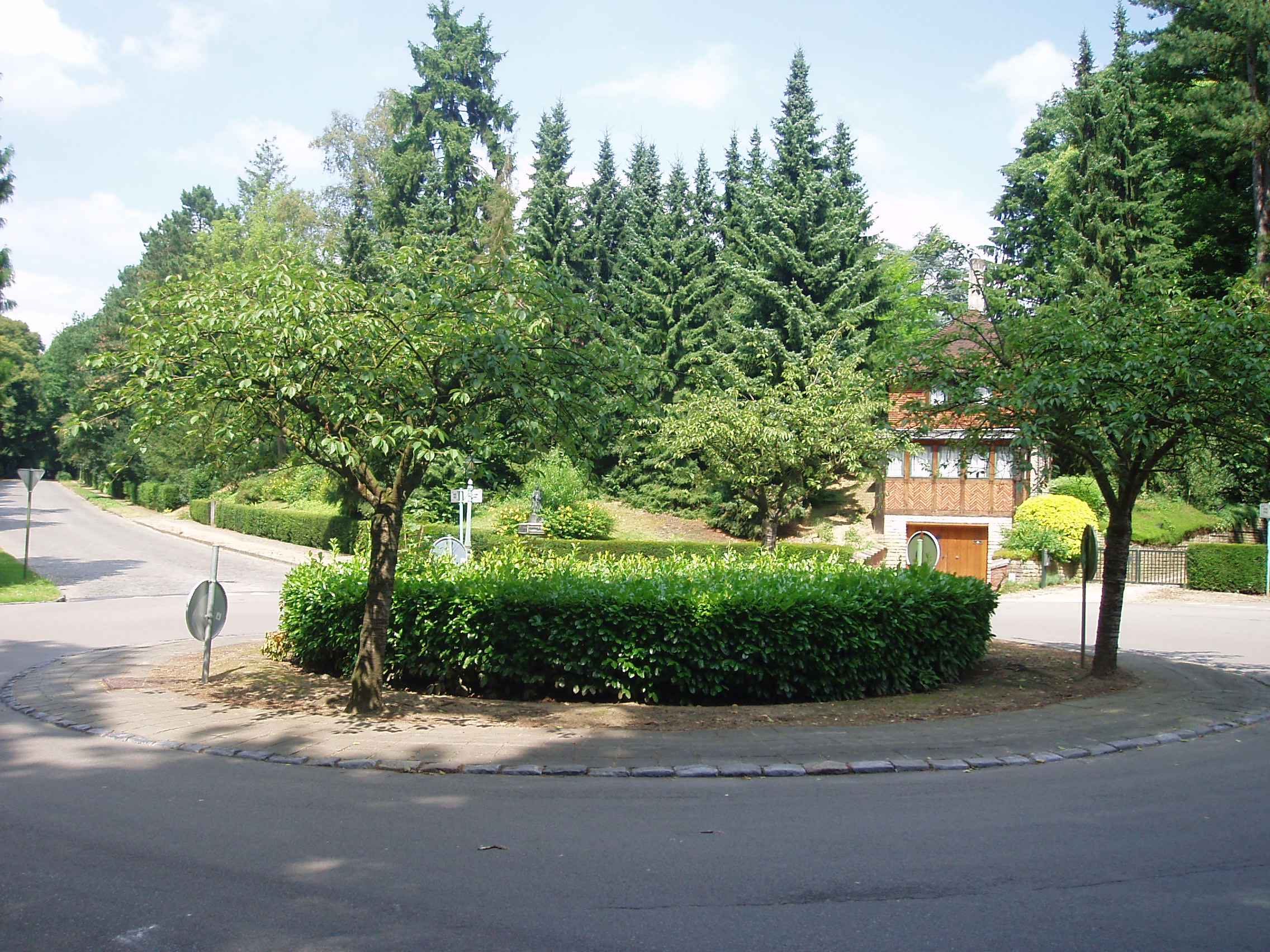 carrefour Sainte Anne Auderghem Belgium